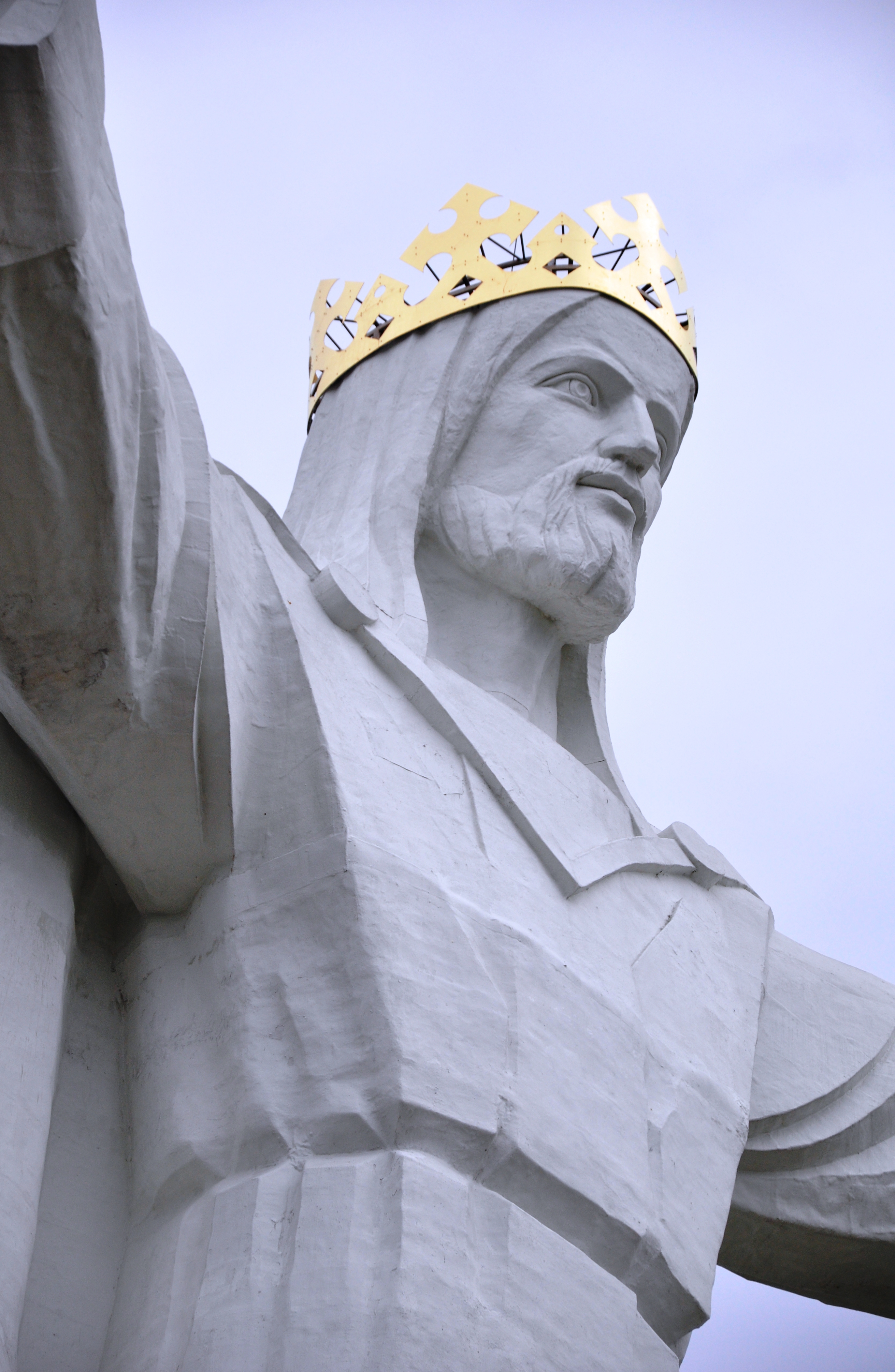 Nahaufnahme